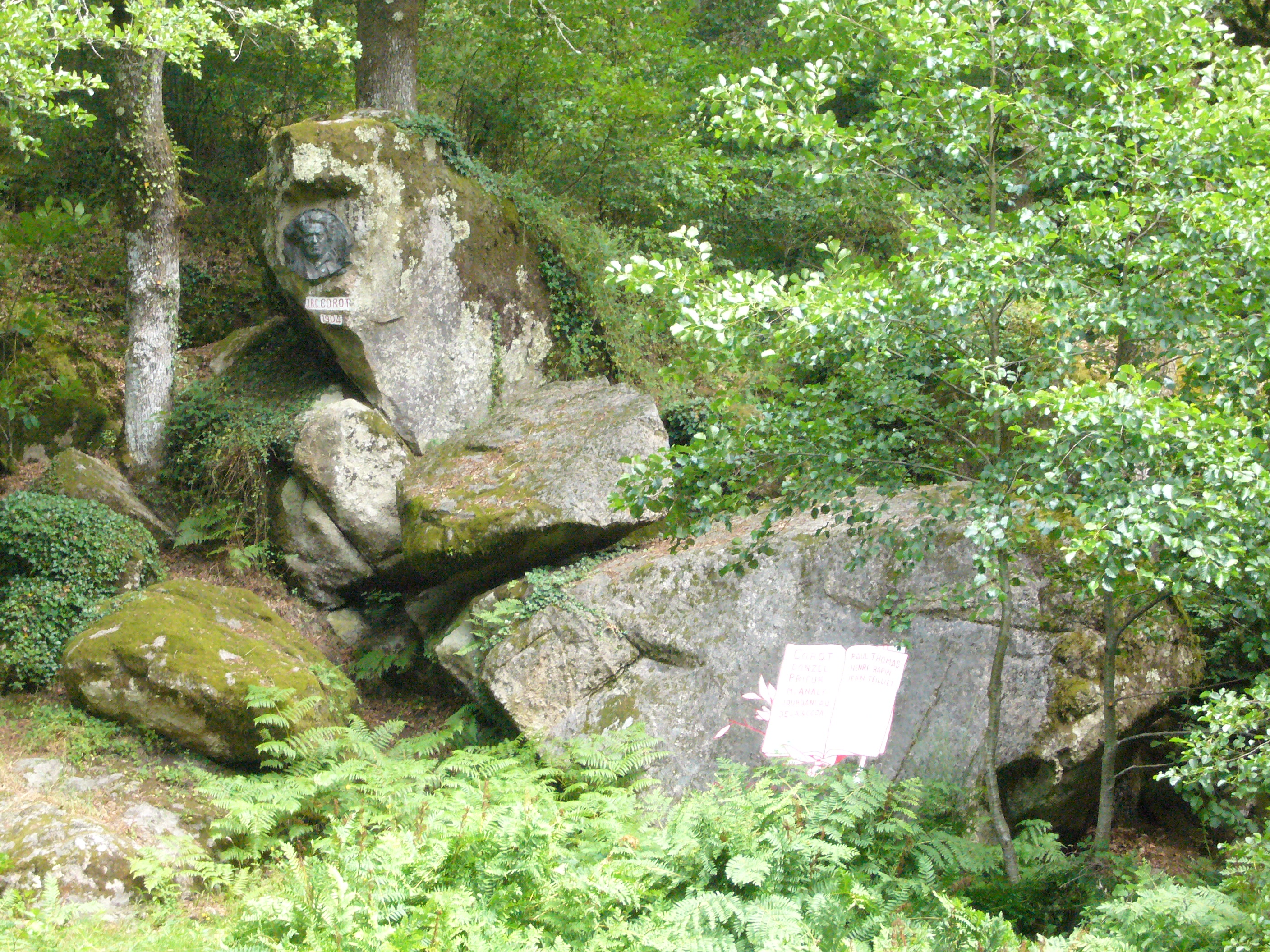 Médaillon en bronze à l'effigie du peintre Corot au site Corot (Saint-Junien, Haute-Vienne, France)